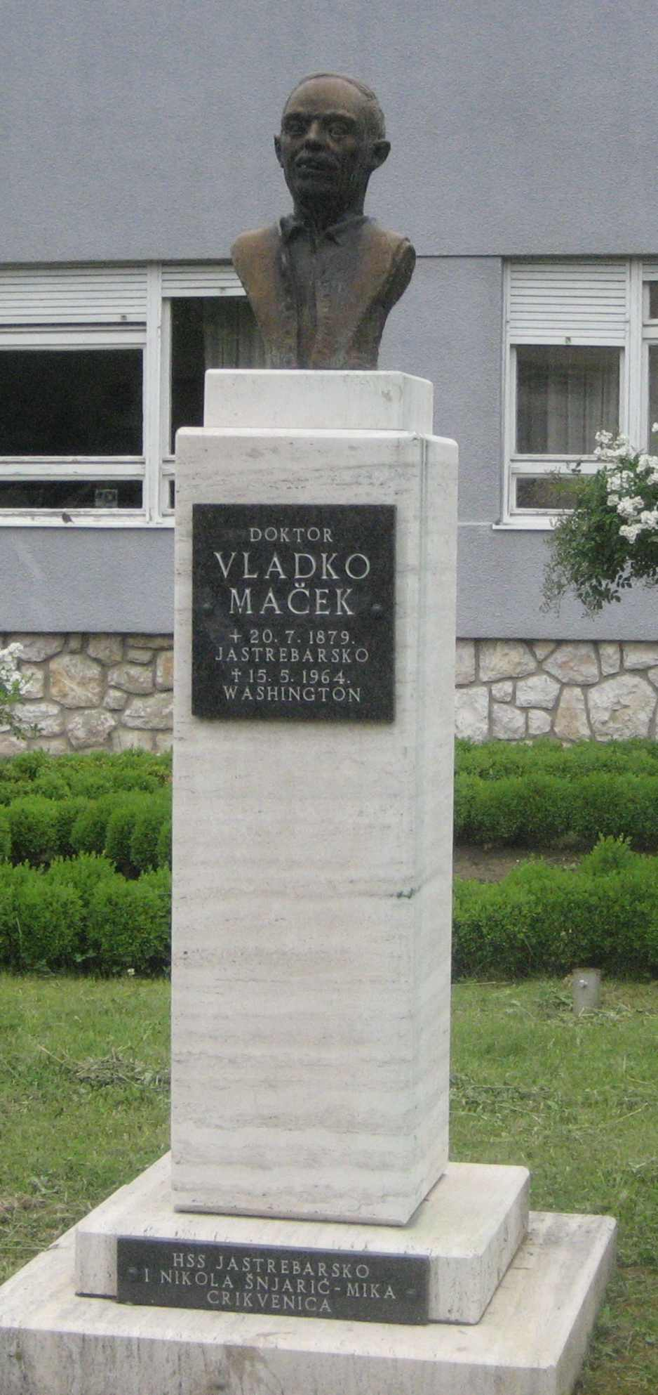 Vladko Maček Memorial, Jastrebarsko, Zagreb